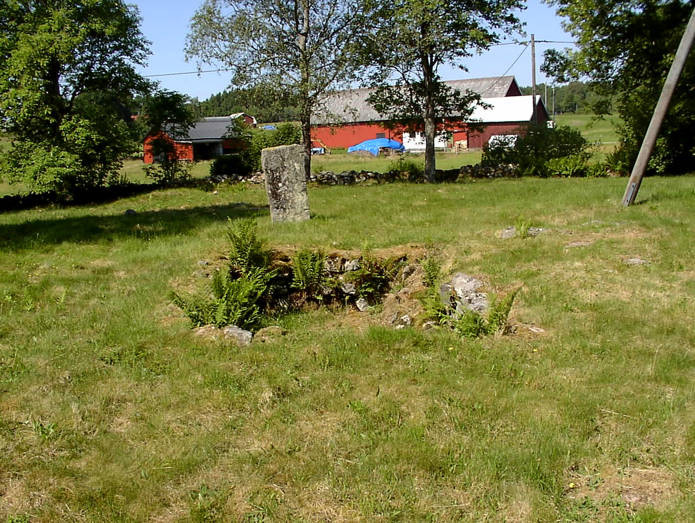 Resterna som är kvar av Ljus gamla kyrka